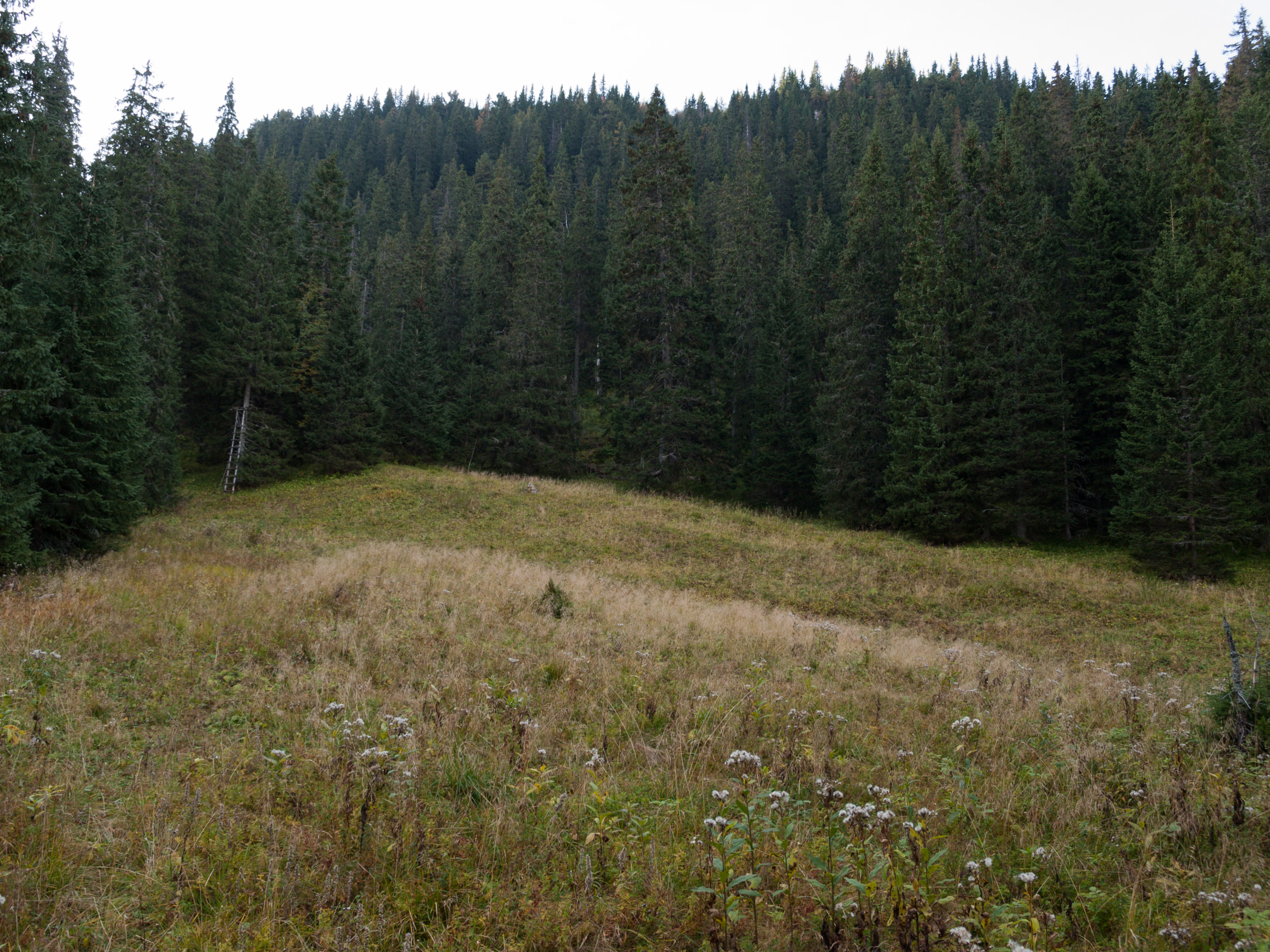 Polana pod UpłazemSlovenčina: Poľana pod Úplazom